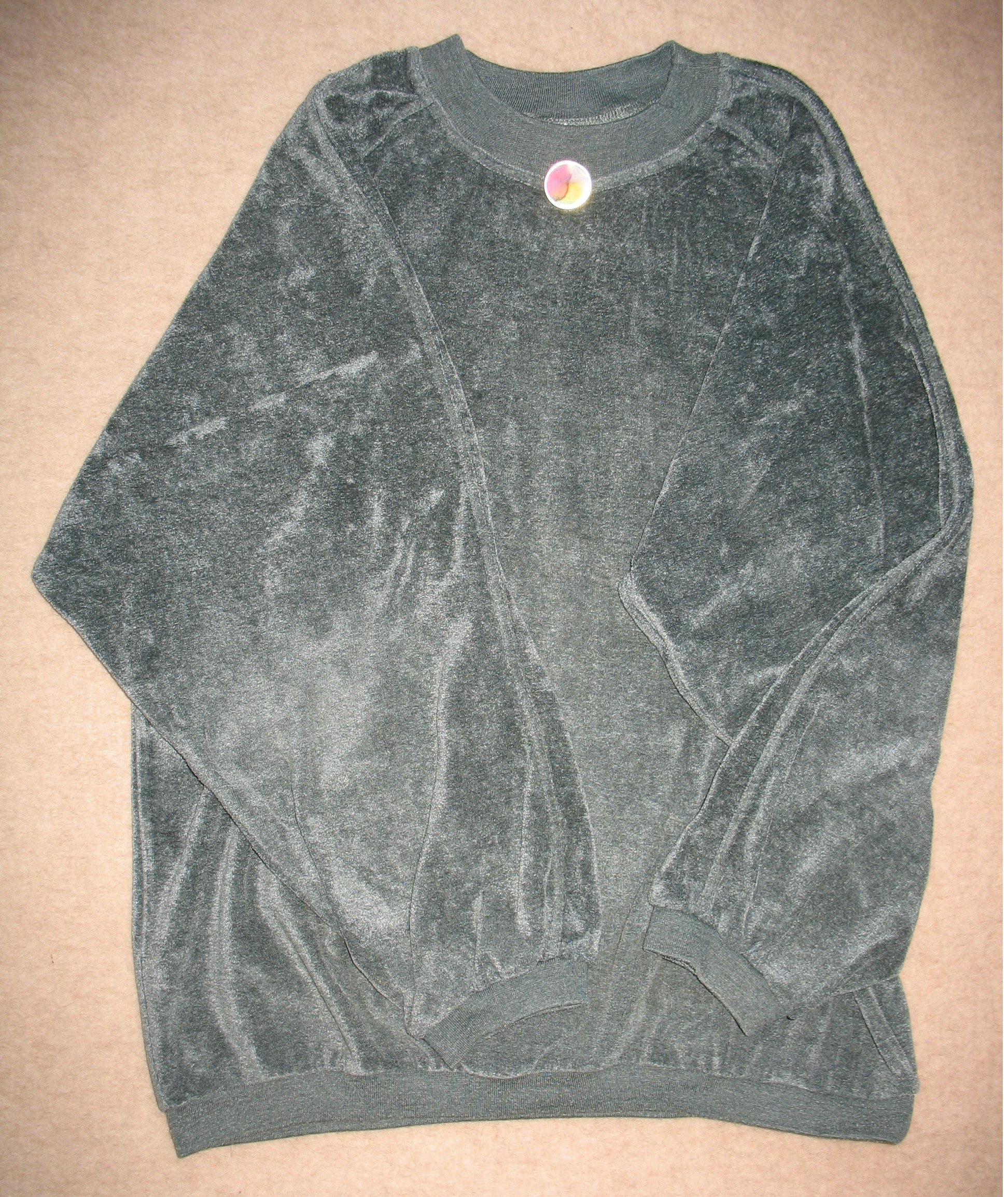 Nicki-Pullover